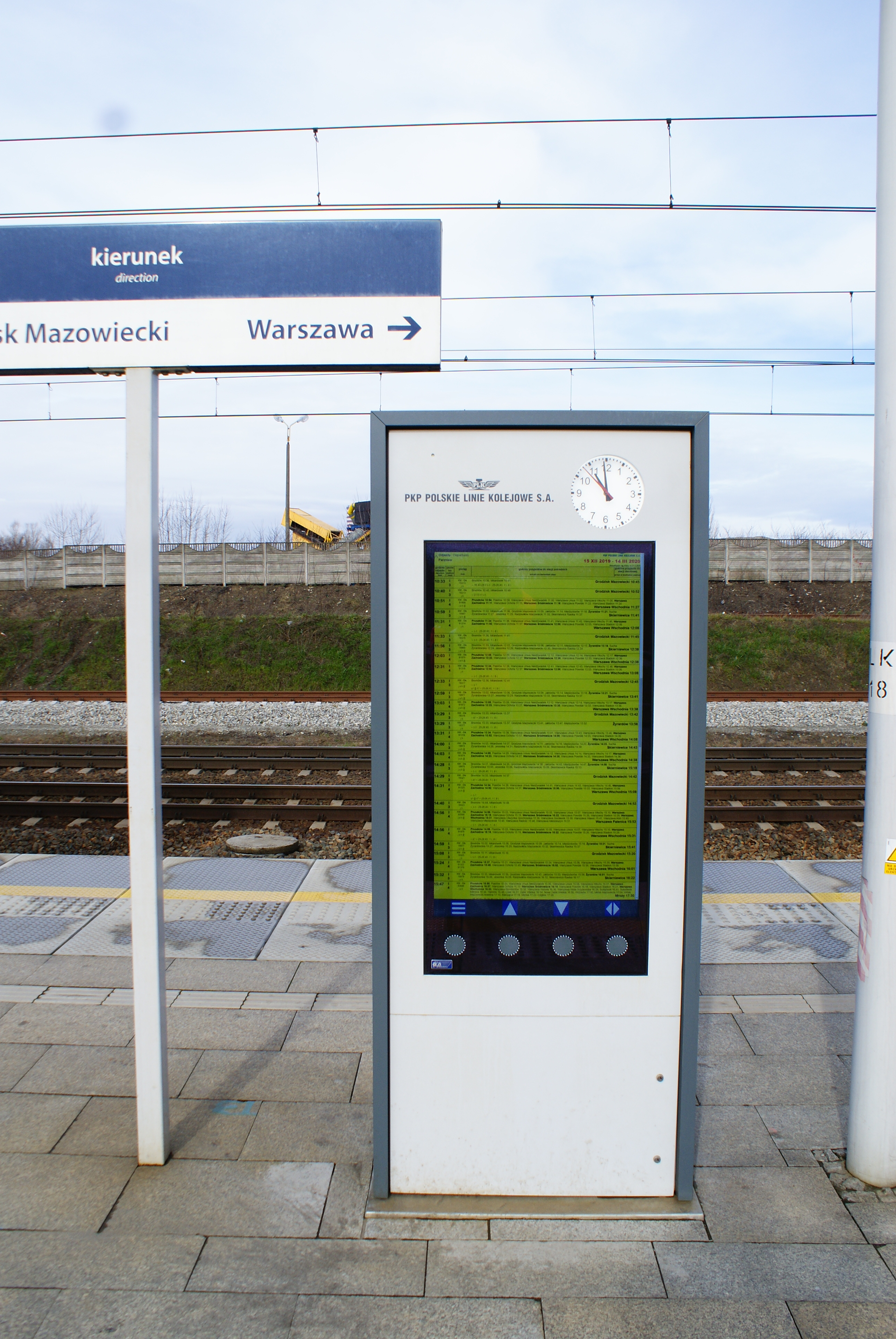 Infokiosk IKZ-20s na stacji kolejowej Parzniew